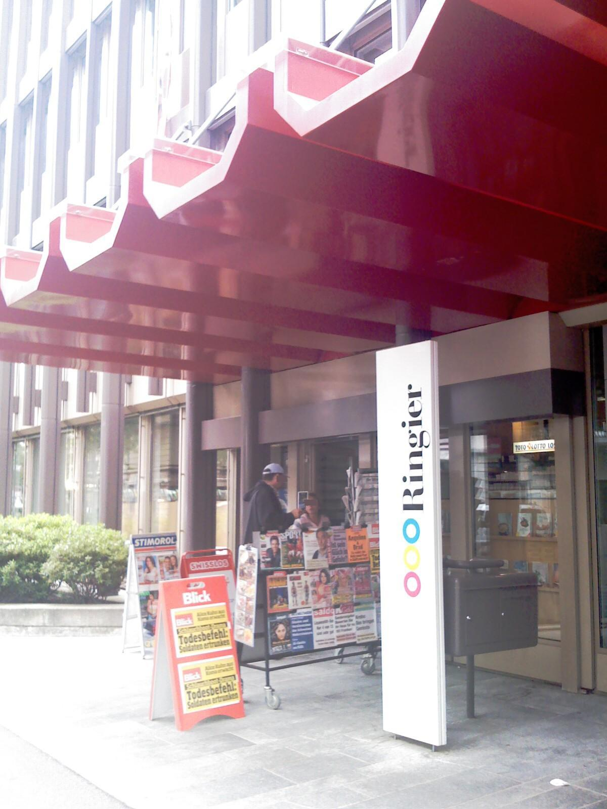 Enirejo de la Gazetara domo de Ringier en Zuriko, Svislando